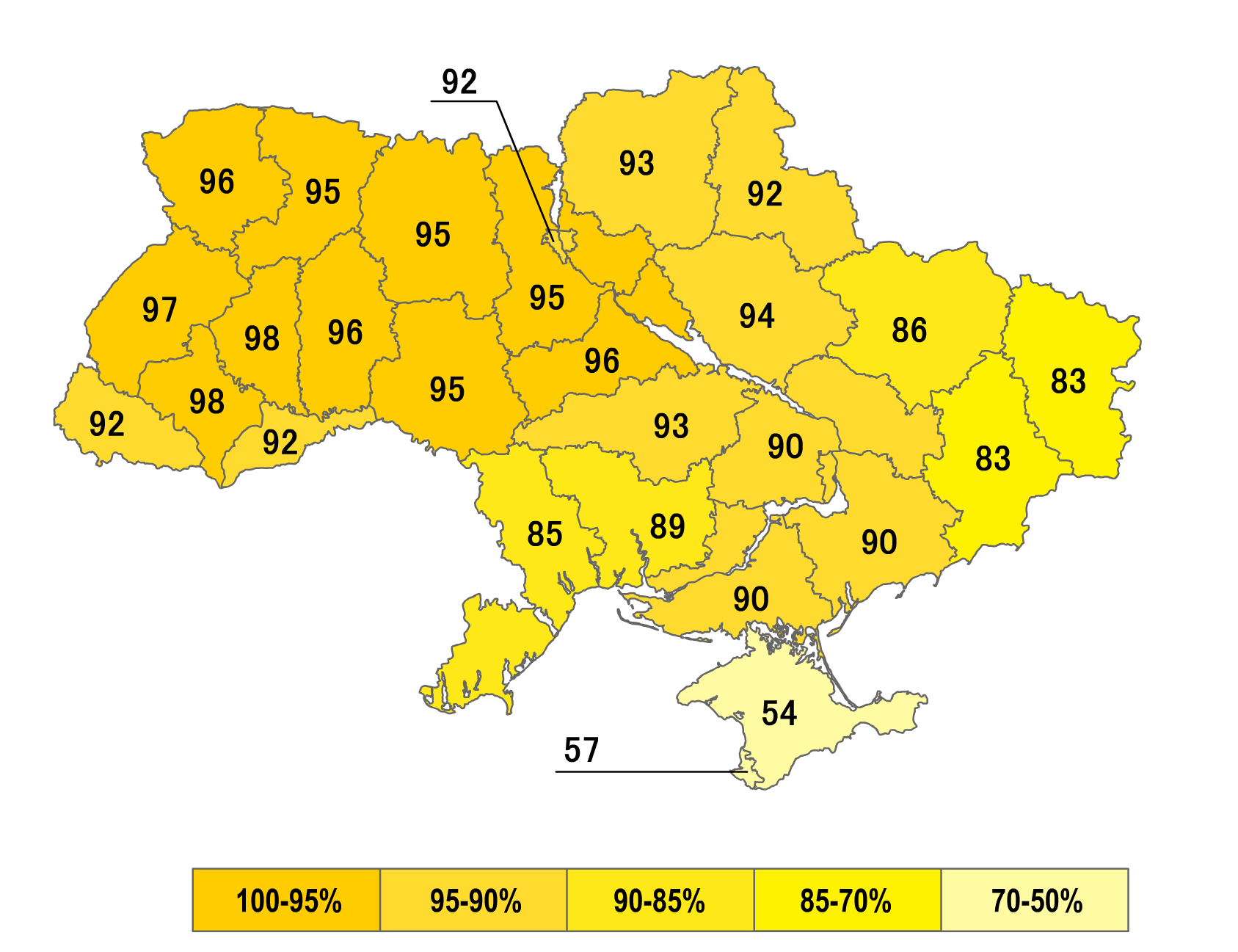 Референдум 1991: Карта. Соті відсотків опущені